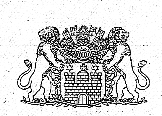 leicht variiertes Hamburg-Wappen in der 1946 gegründeten Wochenzeitung DIE ZEIT. Version von Nr. 1-12 in 1946